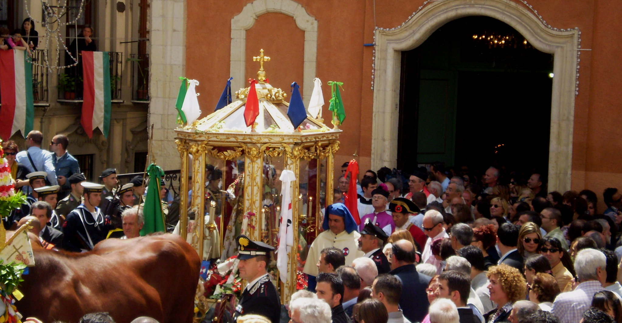 La statua di Sant'Efisio all'uscita dell'omonima chiesa